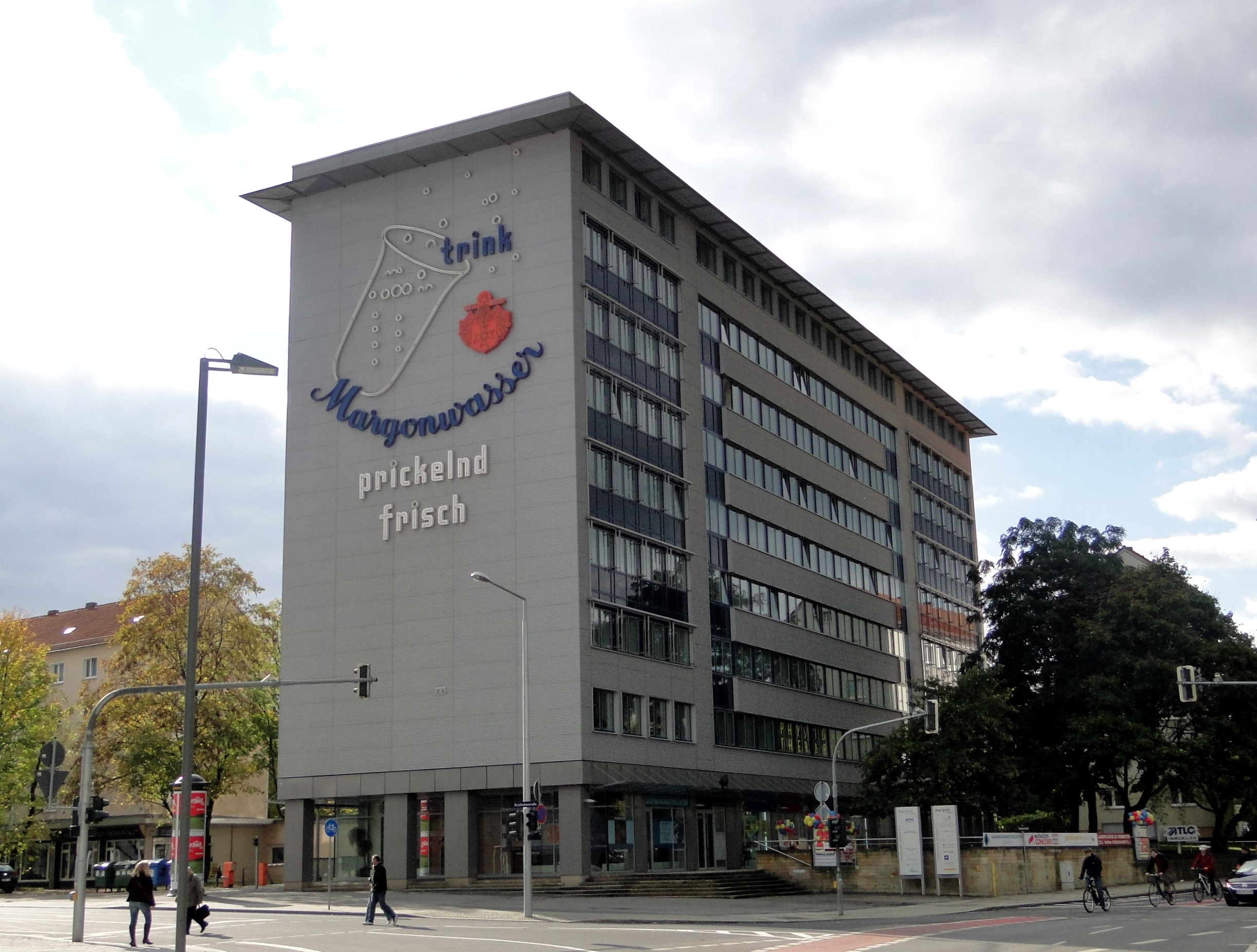 Margon-Haus in der Dresdner Südvorstadt gegenüber der Centrum-Galerie